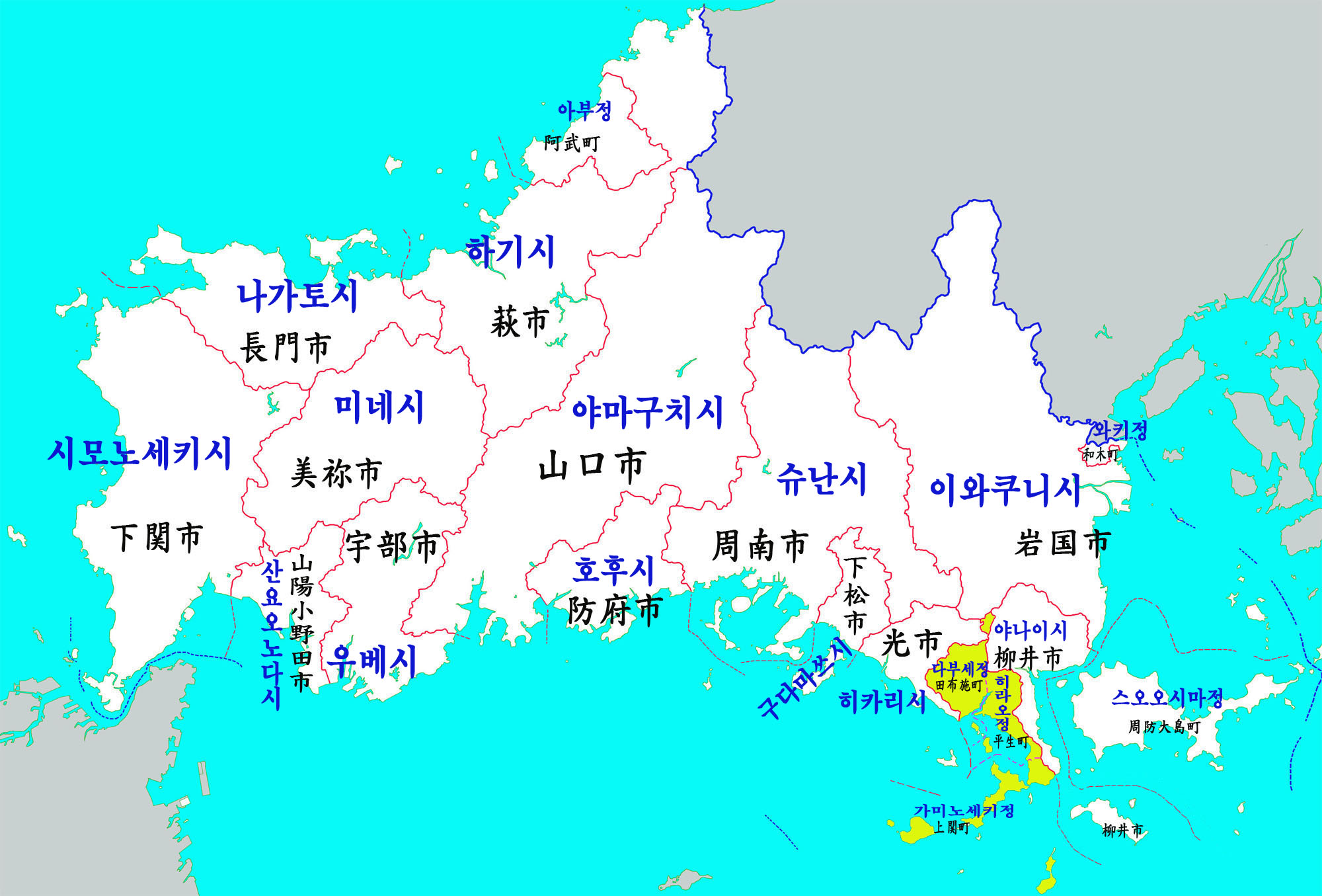 야마구치현 행정구역